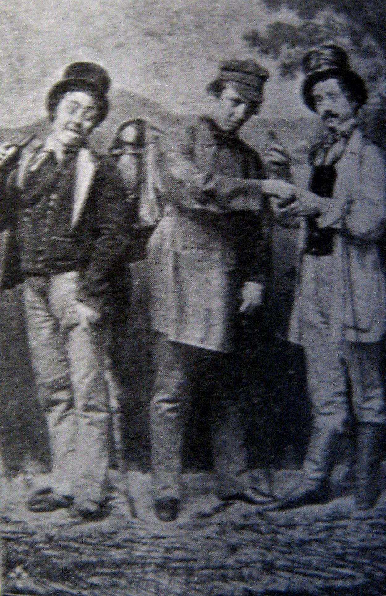 Fotografi av Frans Hodell (1840-1890), August Warberg (1842-1915) och Gustaf Bergström (1837-1904) i rollerna som "Andersson, Pettersson och Lundström". Ur Varia 1902 (men fotot äldre, troligen 1860-talet)